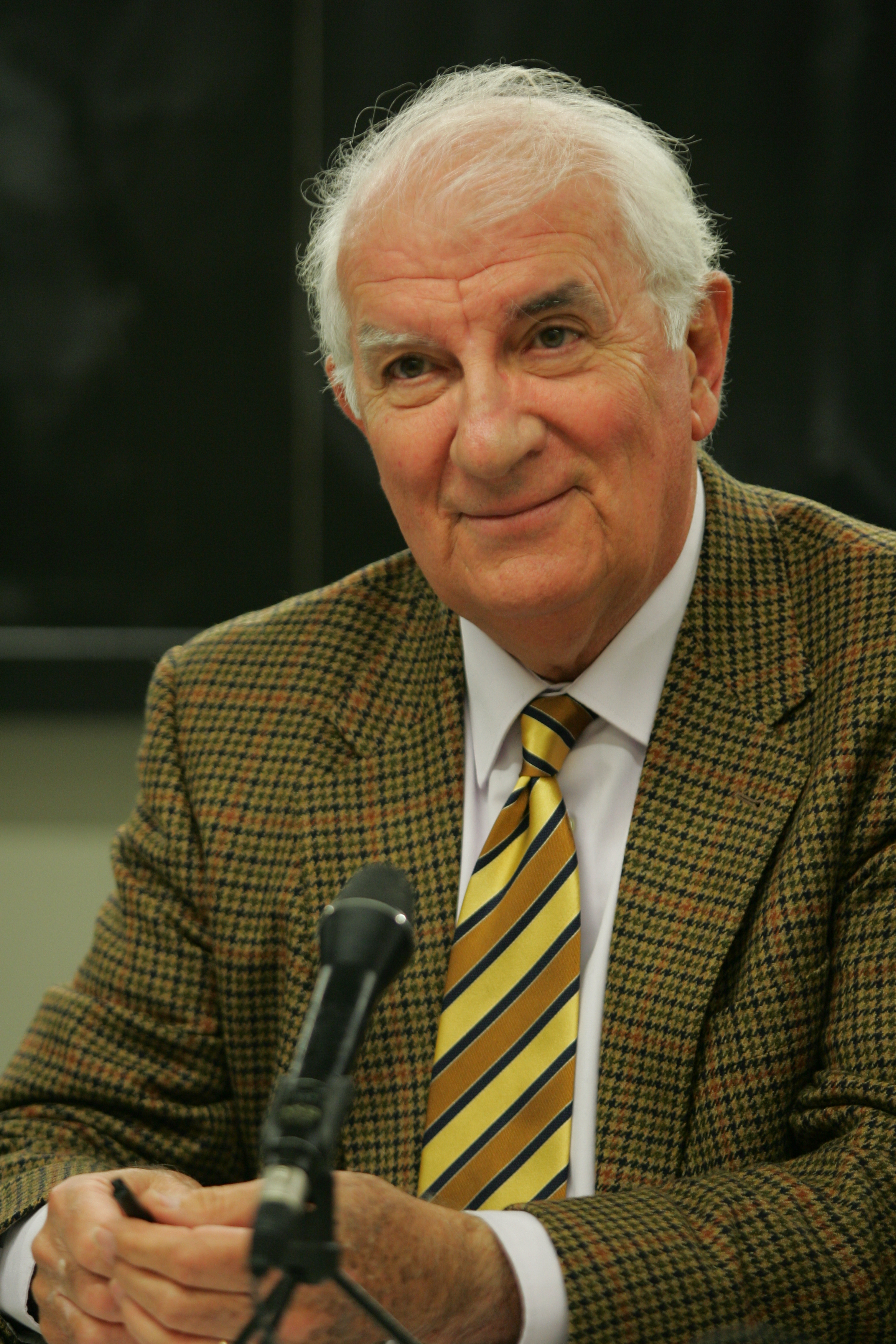 catedrático honorario de la Facultad de Comunicación de la Universidad de Navarra. Experto en radio